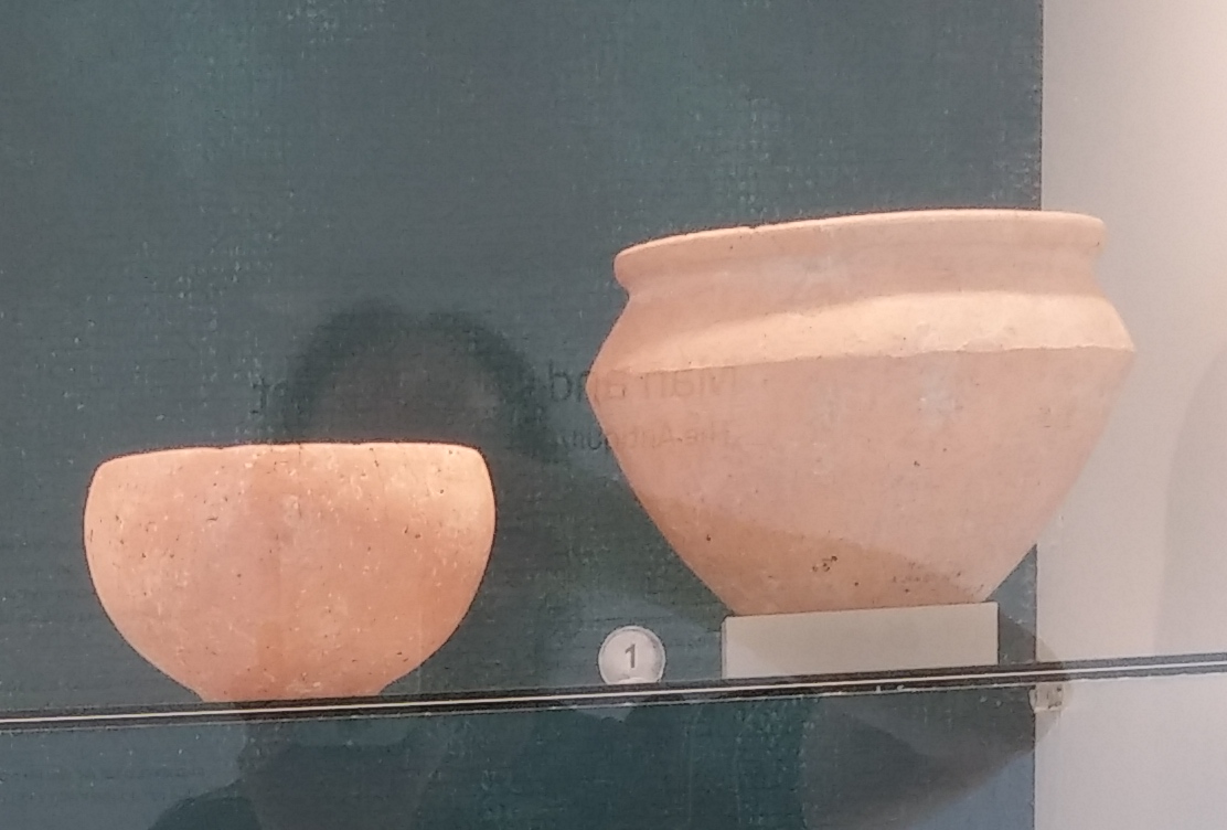 כלי בית ומלאכה קערות | חרס | התקופה הכנענית התיכונה (1550-2000 לפסה"נ | תל ועין זרייק